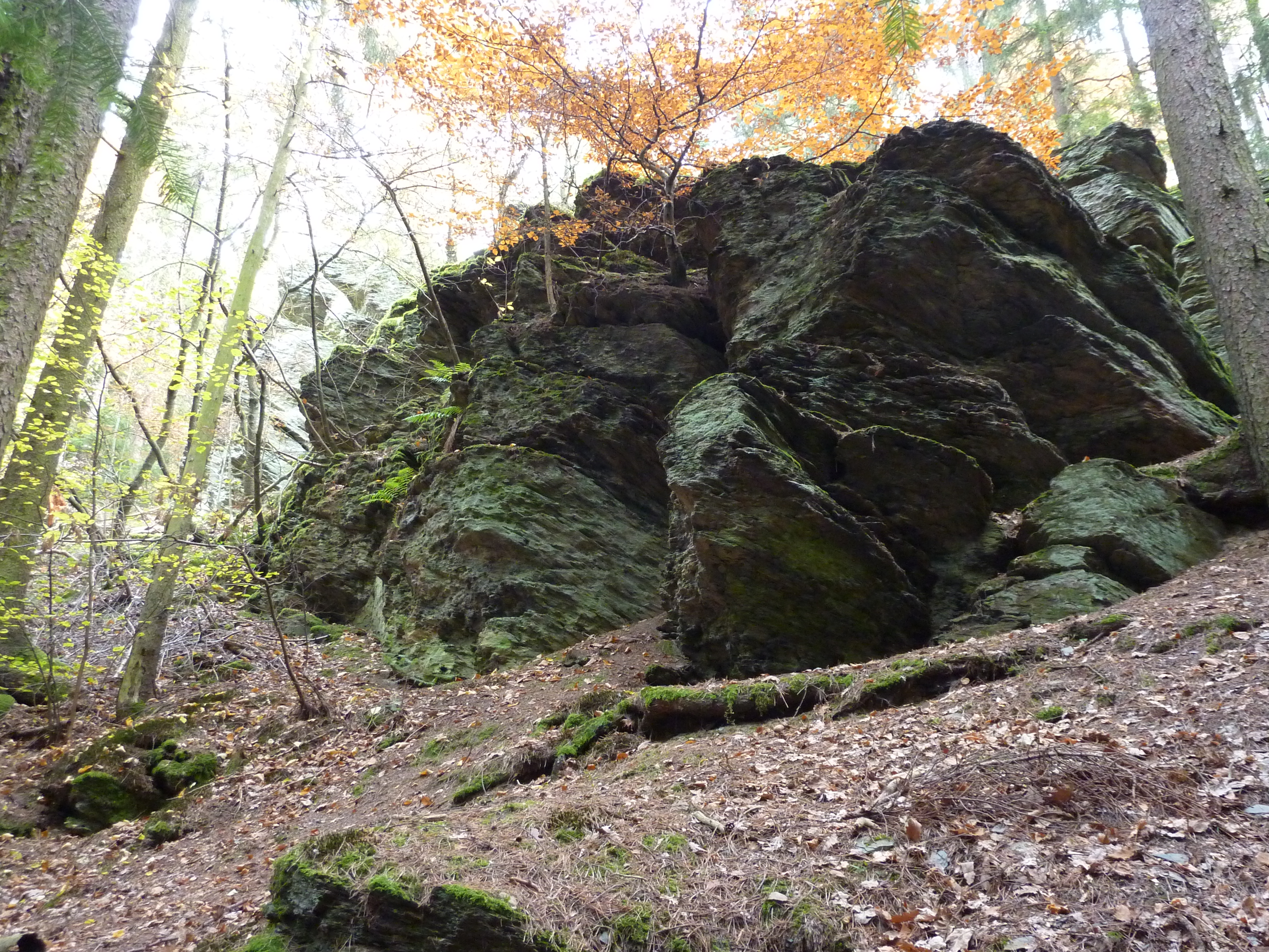 Hinterländer Schweiz bei Gladenbach/Hessen